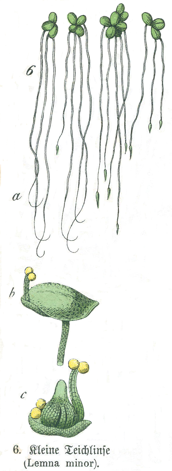 ill. from «Naturgeschichte des Pflanzenreichs», table I